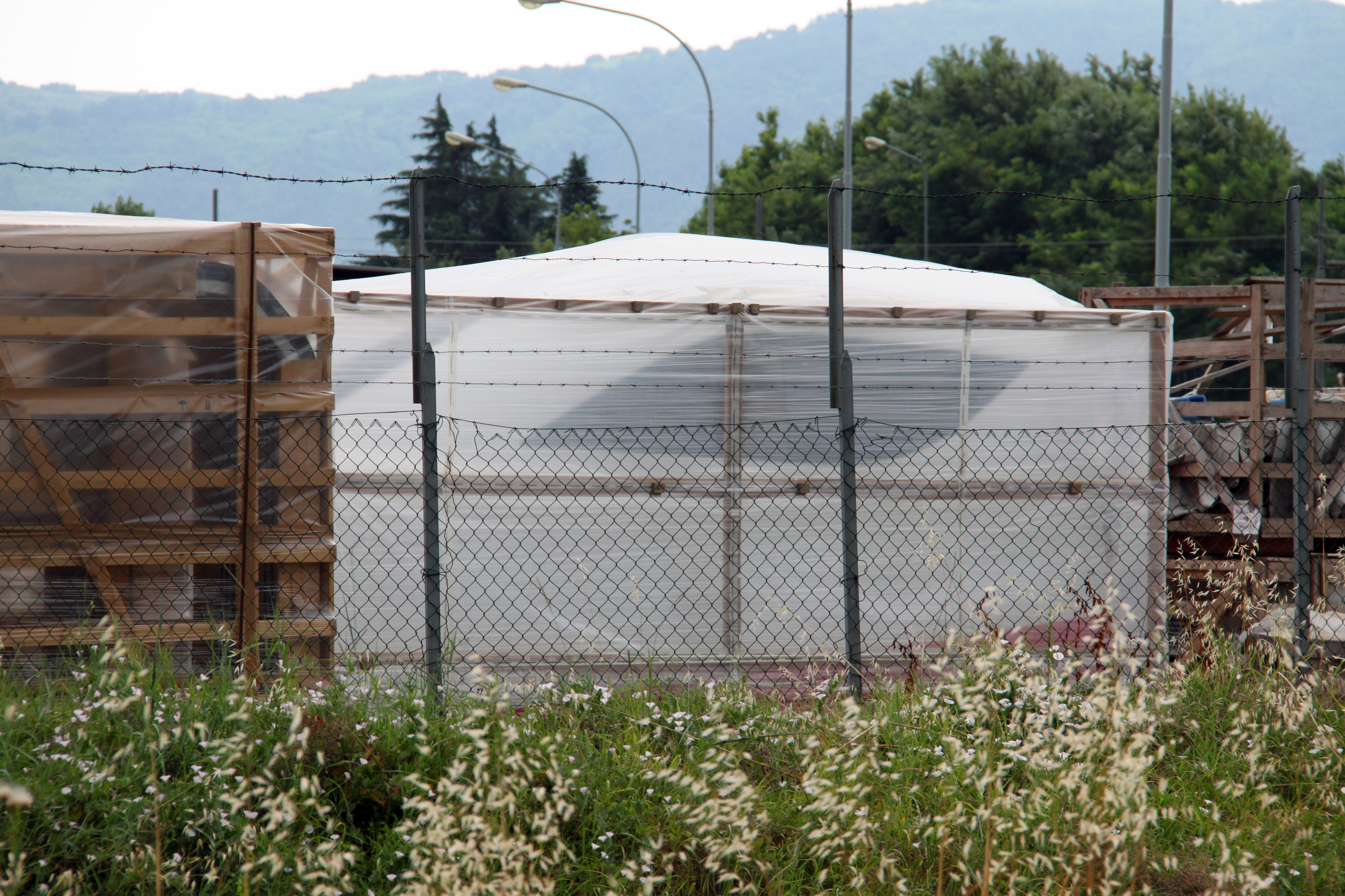 Een kop van de V250 bij de fabriek van AnsaldoBreda bij Pistoia in Italië.